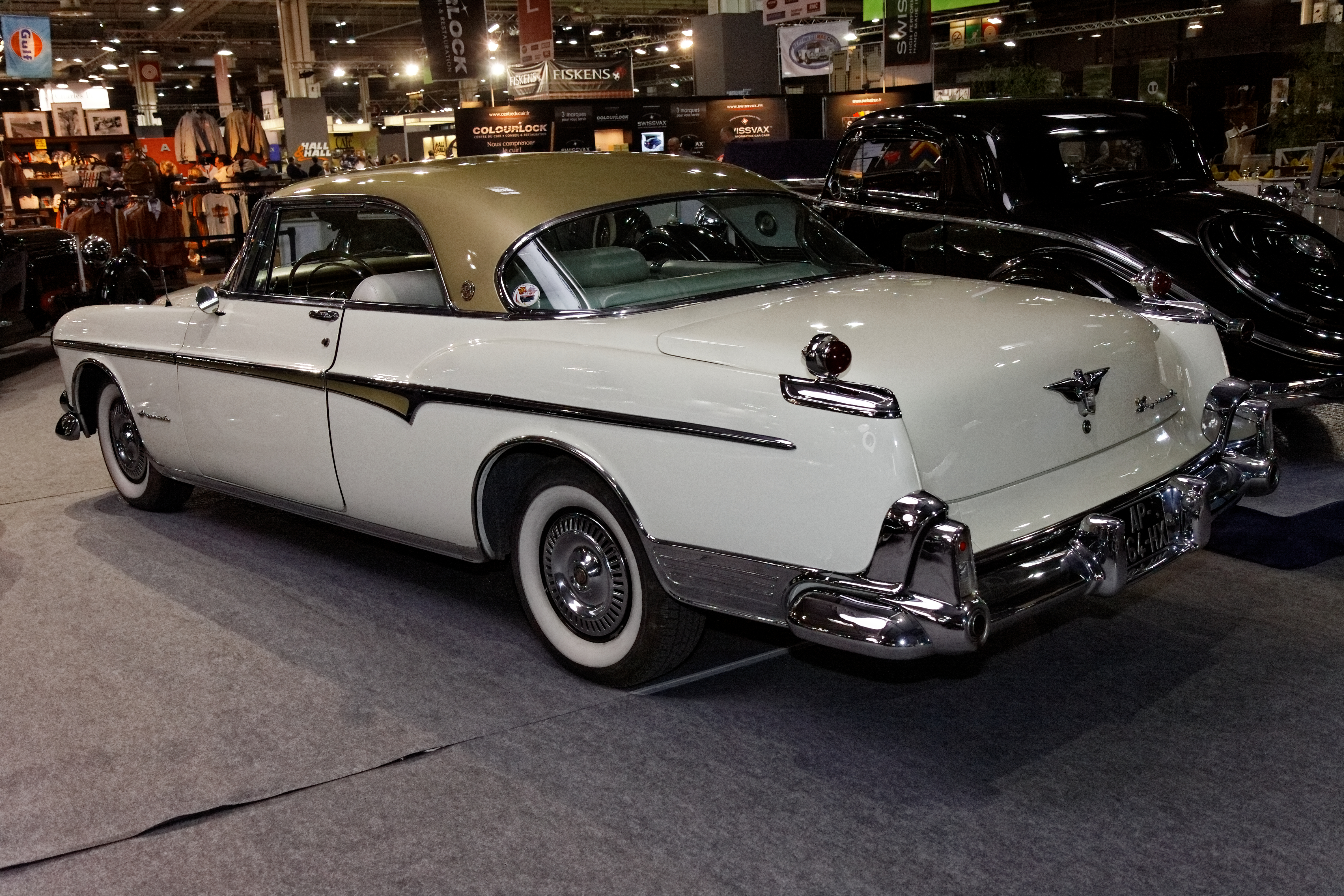 Impérial Coupé Hard-top Newport C69